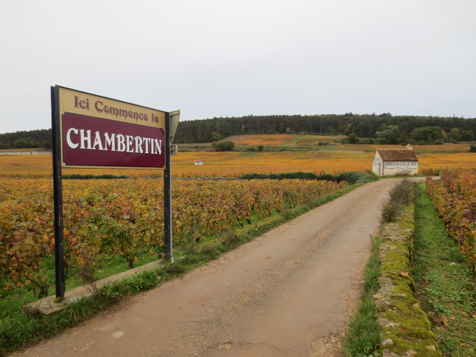 Vignoble de Gevrey-Chambertin